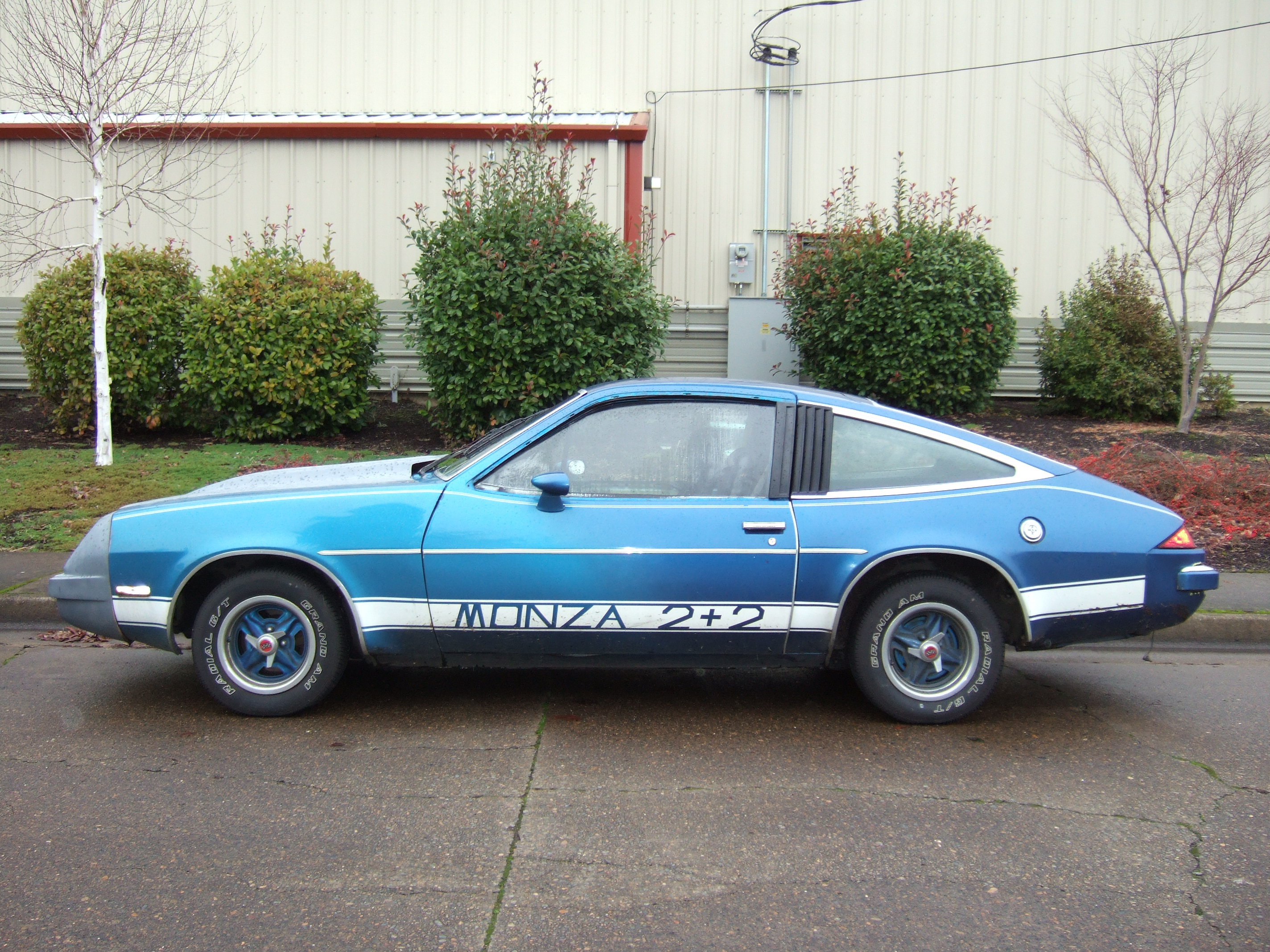 chevrolet monza 2+2